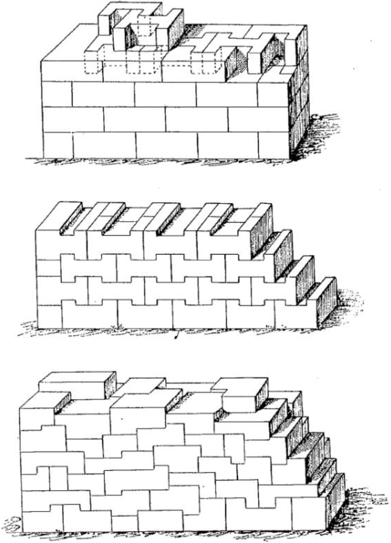 “Opus revinctum”, différentes configurations d'appareillage de pierres de grande taille.